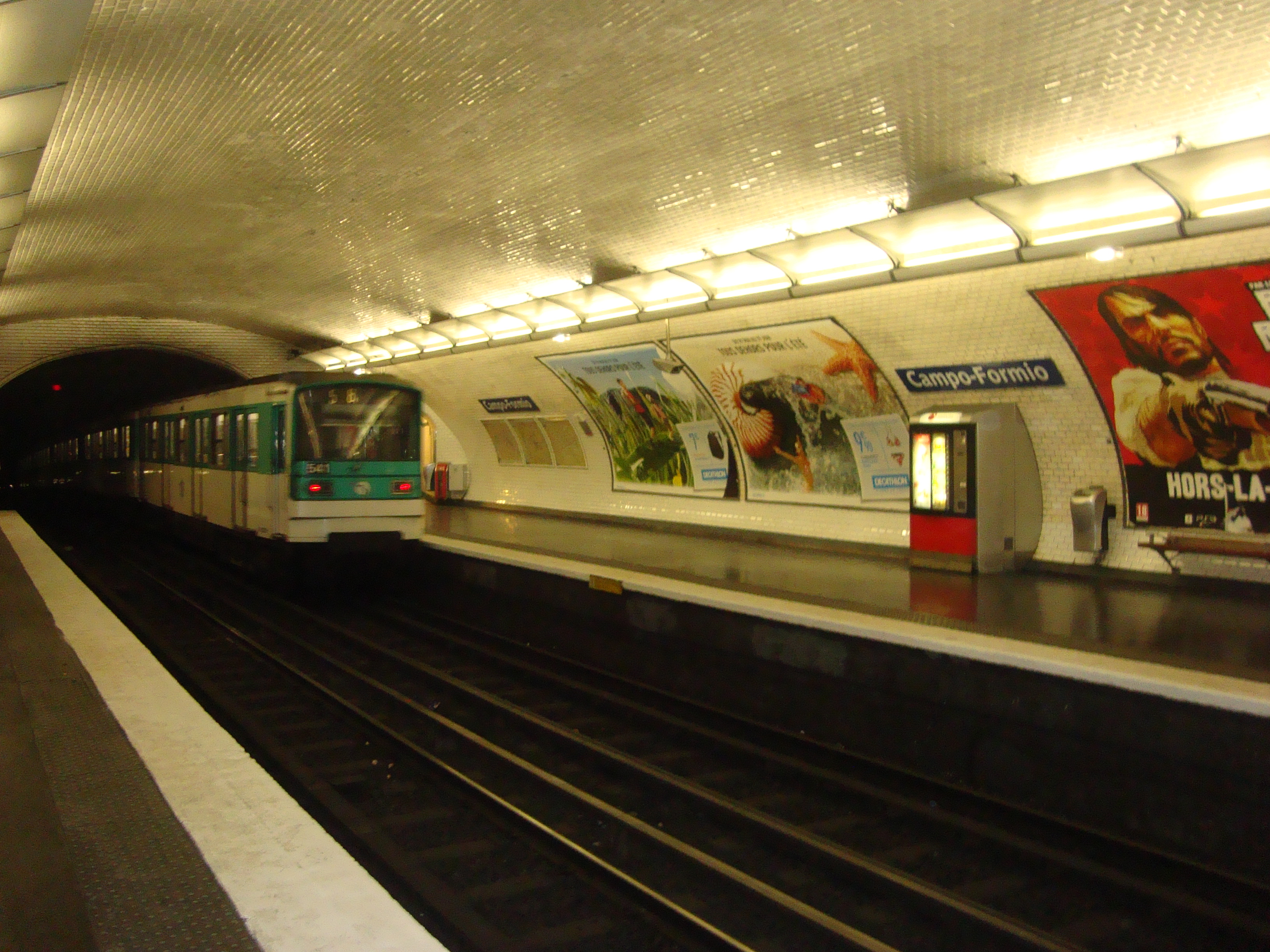 Une rame quitte la station de métro Campo-Formio sur la ligne 5 du métro de Paris